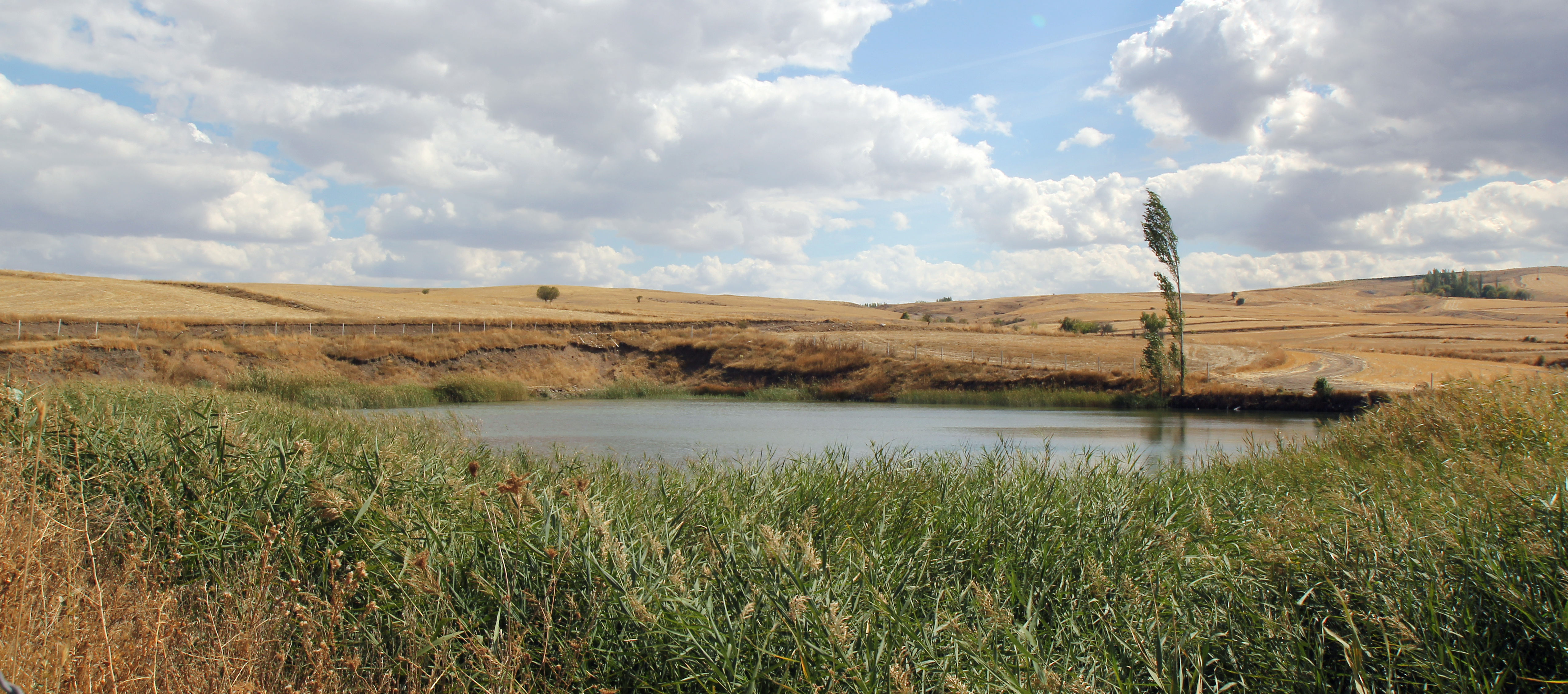 Hethitischer Staudamm von Gölpınar bei Alaca Höyük, Zentraltürkei, Stausee von Nordwesten